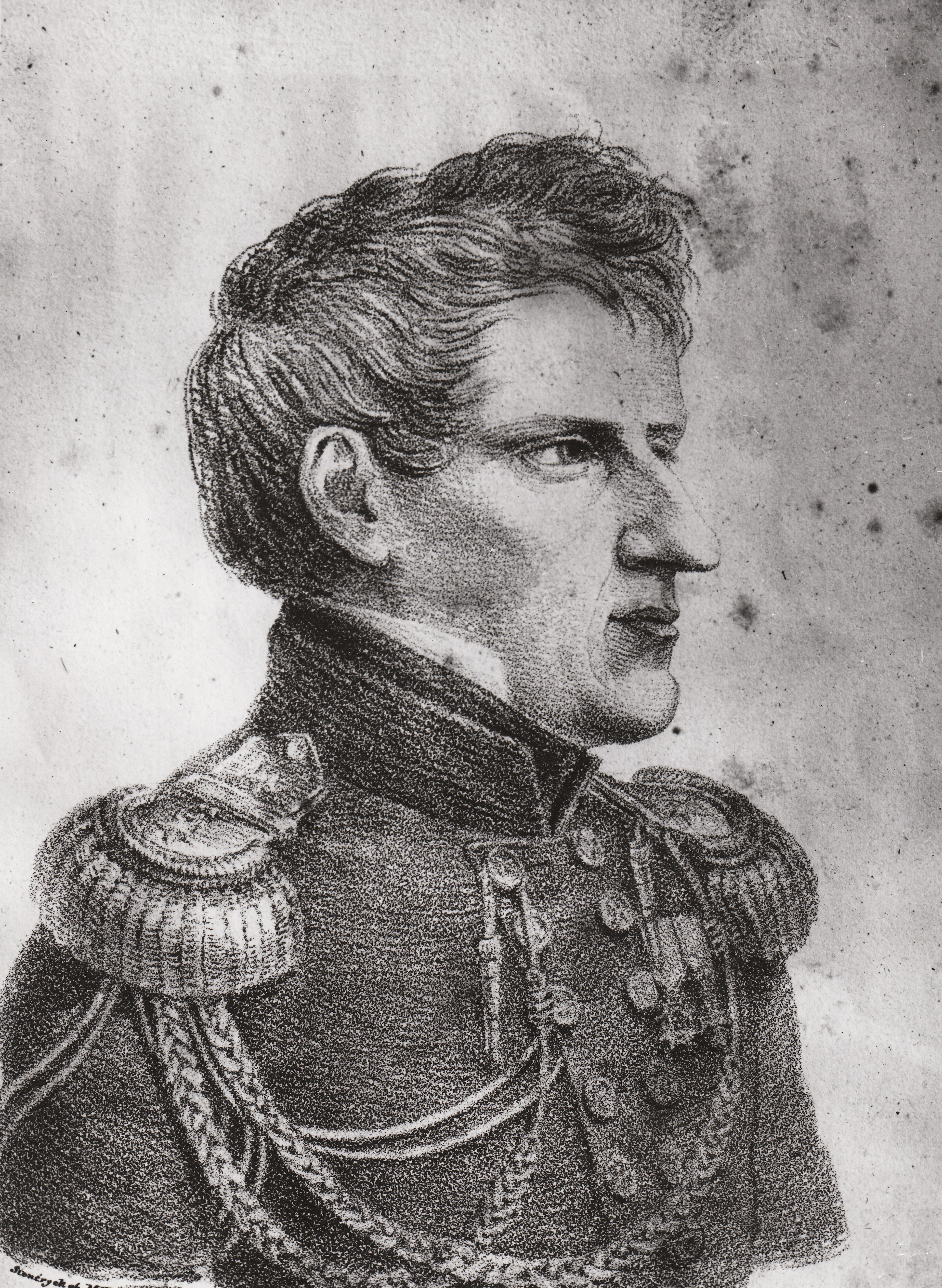 Format: Fotopositiv Baksiden av bildet har påskrevet henvisning til boken Trondheim Bys Historie, bind 3, side 262. Paul Hansen Birch (1788-1863), generalmajor, generalkrigskommisær, og eier av gården "Store Ullevål". I 1800 gikk han på krigsskole, og ble i 1805 fenrik ved Søndenfjelske regiment og repetent ved Landkadettkorpset. Birch ble i 1806 sekondløitnant og lærer ved regimentets underofficersskole i Fredrikshald. Ved riksforsamlingen på Eidsvoll i 1814 fungerte Birch som vaktkommandør. Han ble kort etter kaptein og divisjonsadjutant i generalstaben. Birch ledsaget Carl Johan til kroningen i Trondheim i 1818, ble i 1820 oberst og i 1821 generaladjutant. Han var en drivende kraft når det veldedighetsarbeid i Kristiania. I Trondheim foreslo han i 1826 opprettelsen av selskapet 'De nødlidenes Venner'. General Birchs gate (Oslo) er oppkalt etter ham. Kilde: Wikipedia